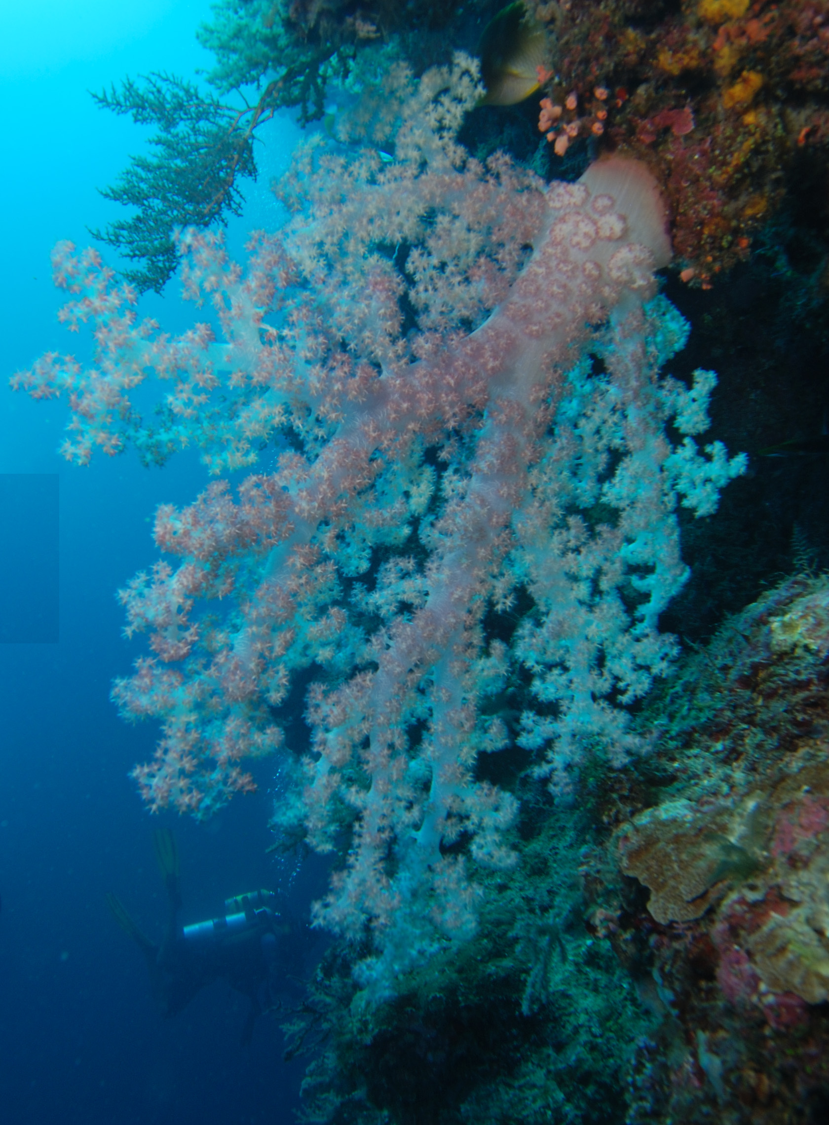 dendronephthya